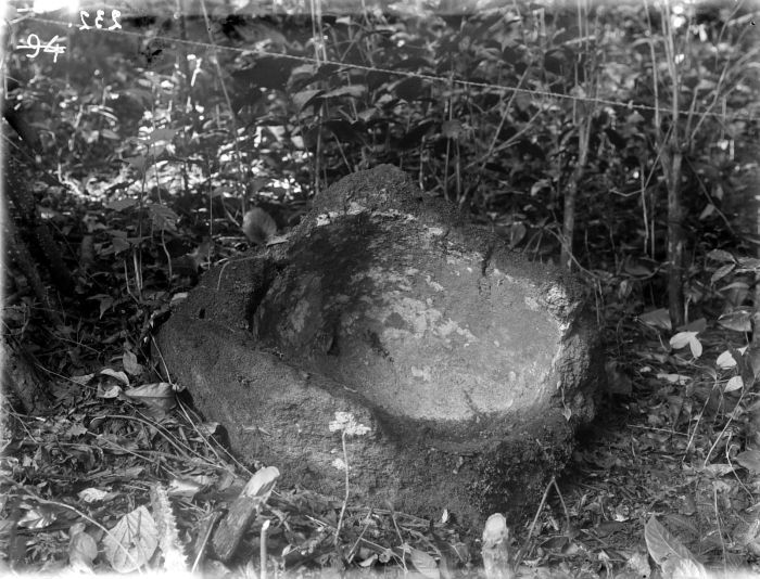 Negatief. Megalitisch object in de buurt van Djepara bij het Ranau-meer